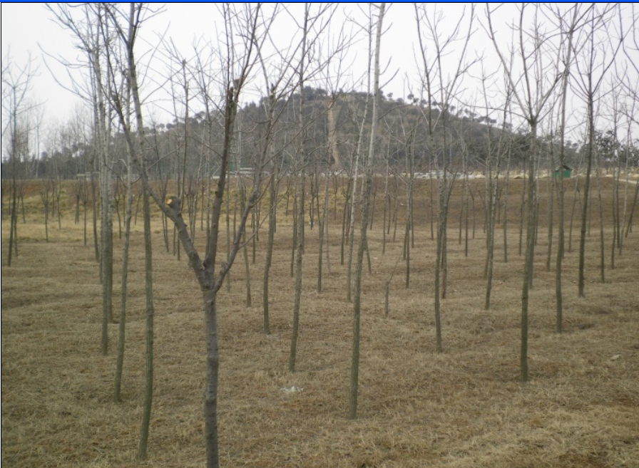 位于汉文帝霸陵范围内，今天西安的白鹿原上